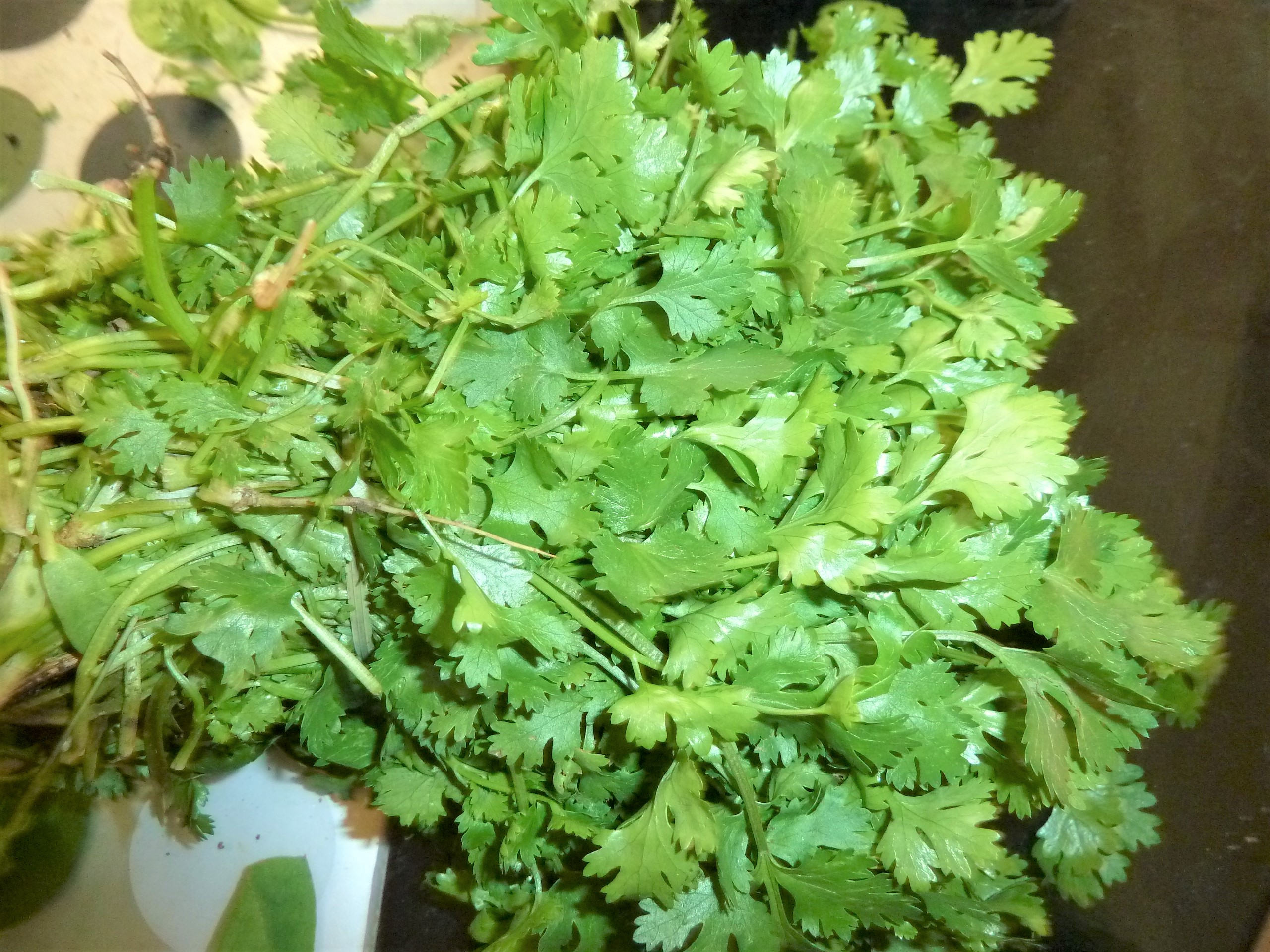 కొత్తిమీర కట్ట